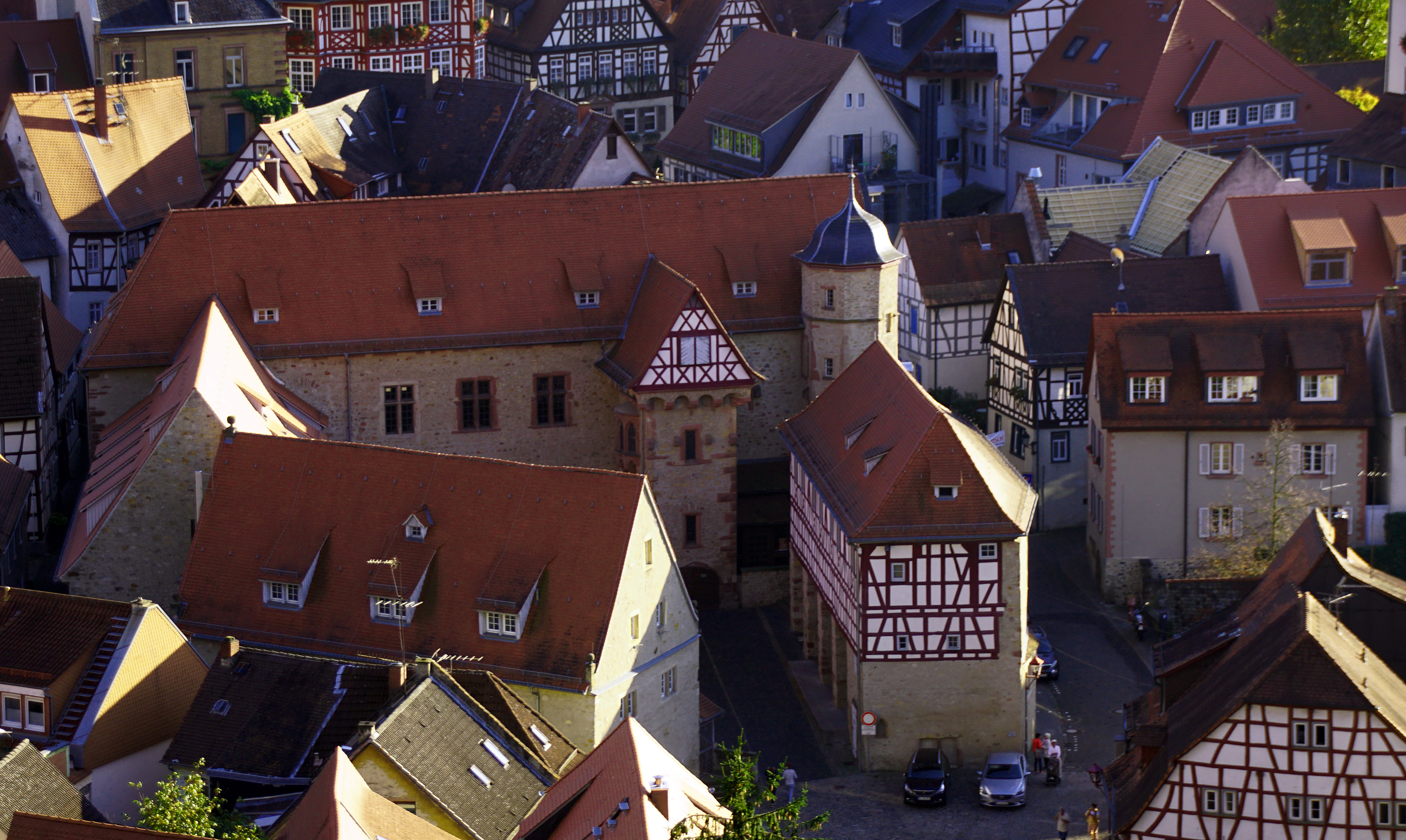 Geo-Naturpark Bergstraße-Odenwald Amtshof und Altstadt Heppenheim